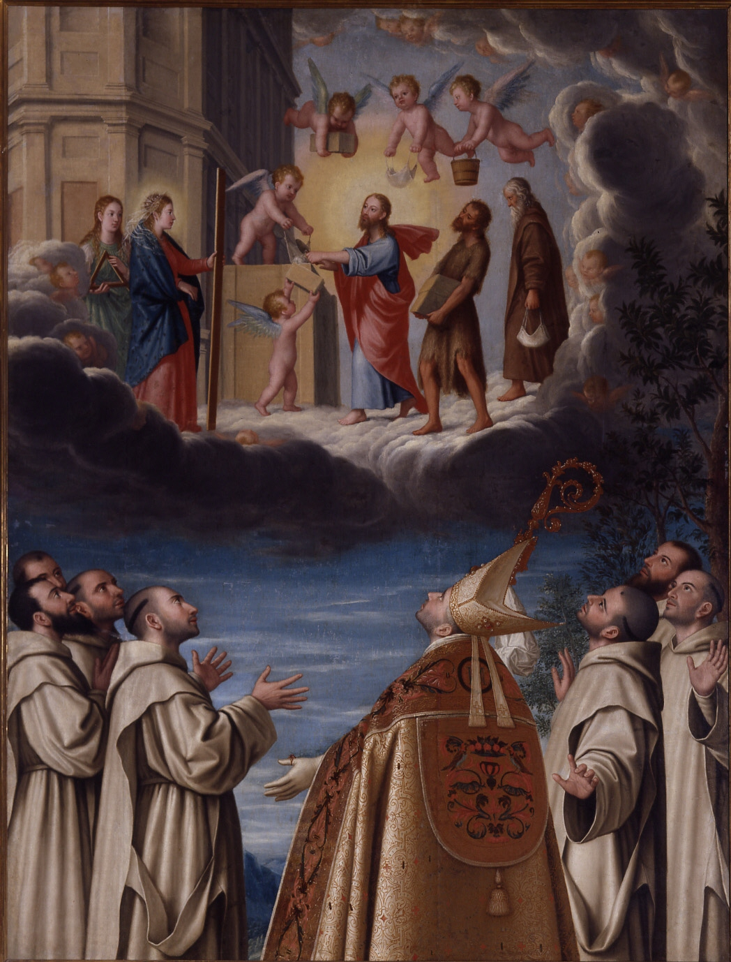 La obra representa a San Hugo de Grenoble teniendo una visión celestial.